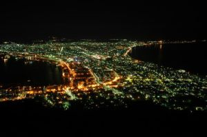 Hakodate Nightview, Hokkaido, Japan 函館山からの夜景(2005年9月撮影)